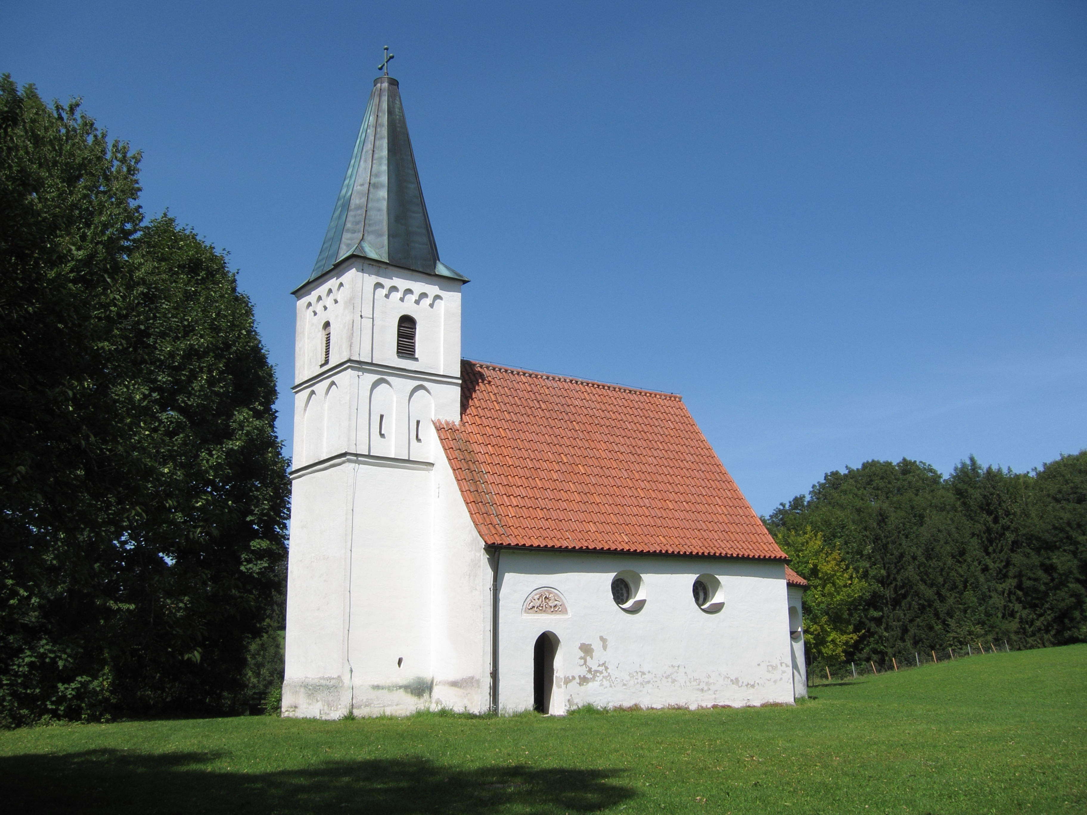 Wartenberg; Ehem. Burgkapelle St. Nikolaus auf dem Berg der abgegangenen Burg Wartenberg, kleiner Saalbau mit Apsis und romanischen und gotischen Stilelementen, 12./13. Jahrhundert; mit Ausstattung.